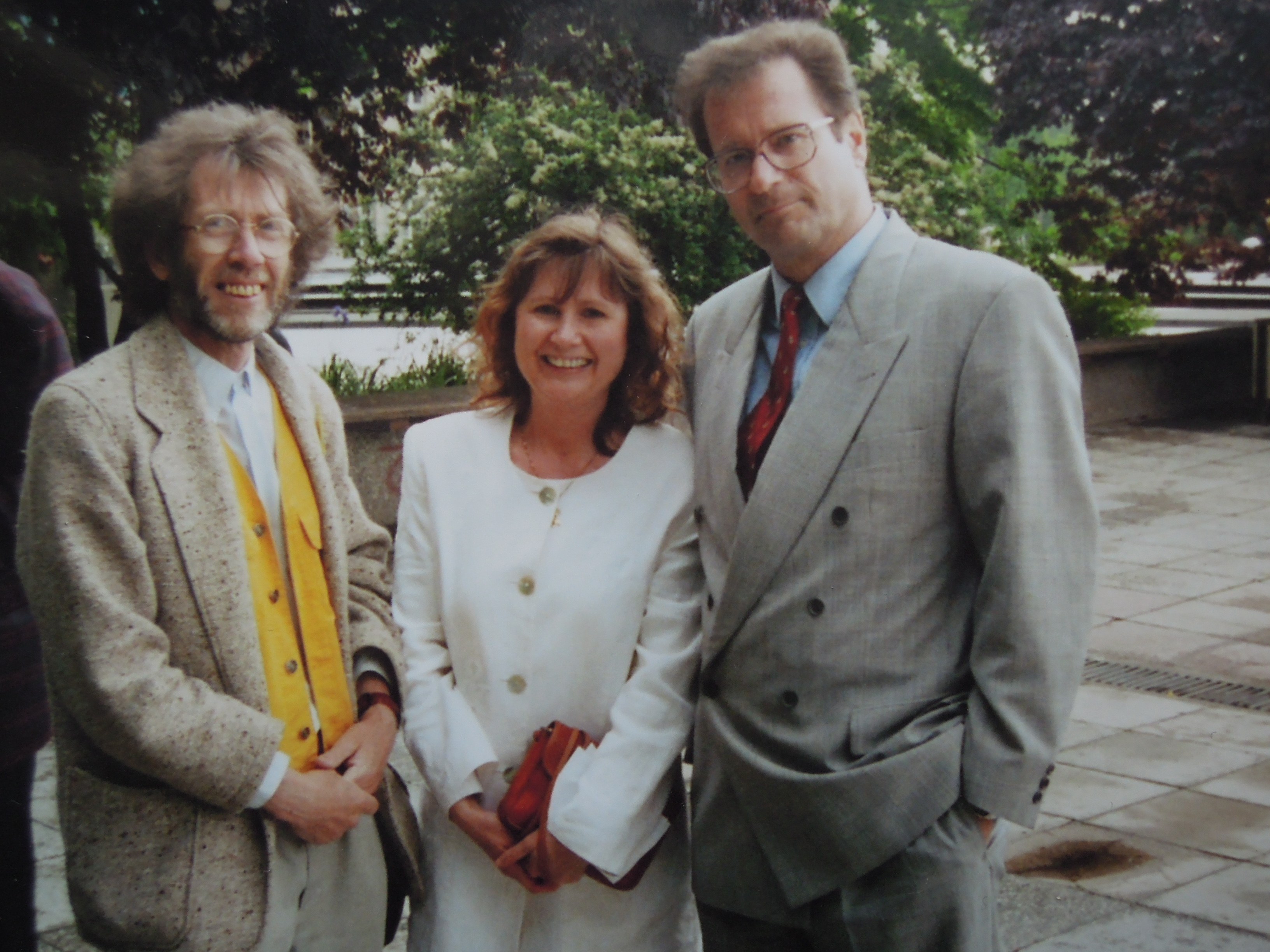 Klaus Kinkel, FDP-Vorsitzender, 1994 auf dem Parteitag in Rostock, zusammen mit Ulrich Brinkhoff und Monika Brinkhoff.